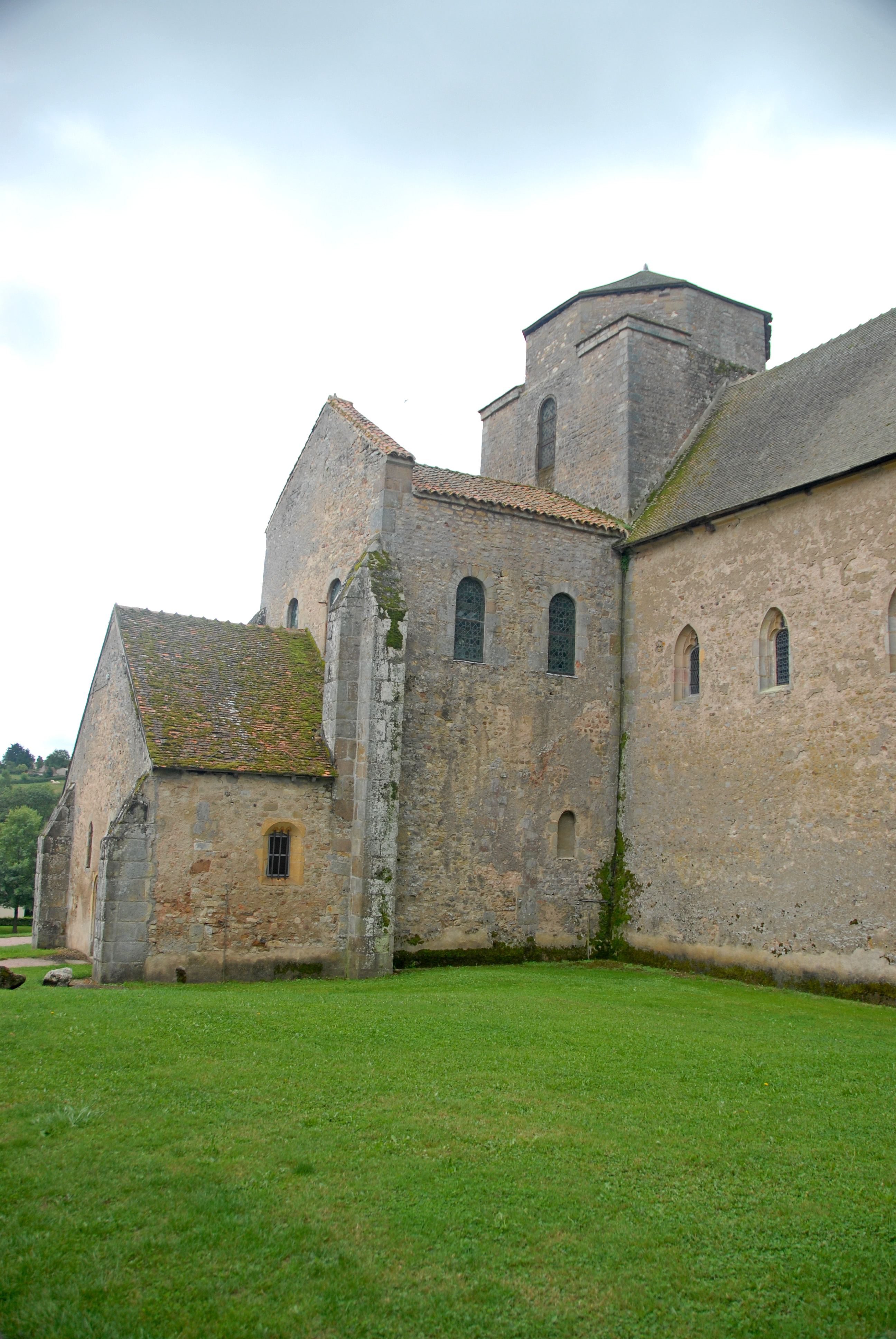 Abteikirche, nordwestl. Querhausarm von W